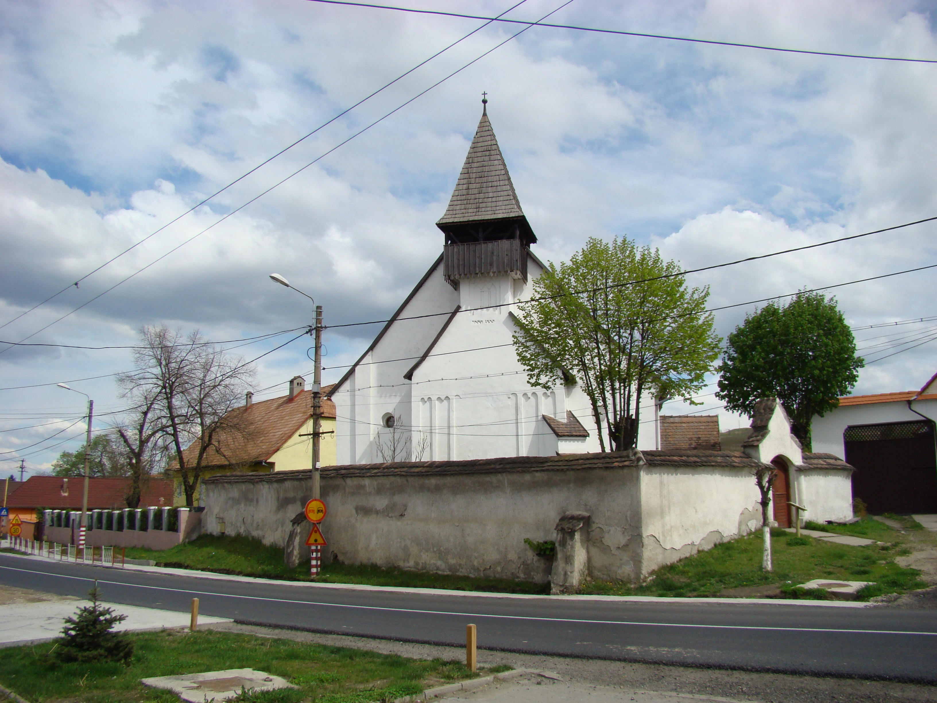 Ansamblul bisericii evanghelice, oraș Copșa Mică, str. Mediașului 100